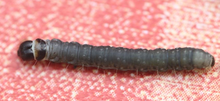 Archips xylosteana, 2 cm lange Raupe am 10. Mai 2020 in einem Buchenblattwickel gefunden